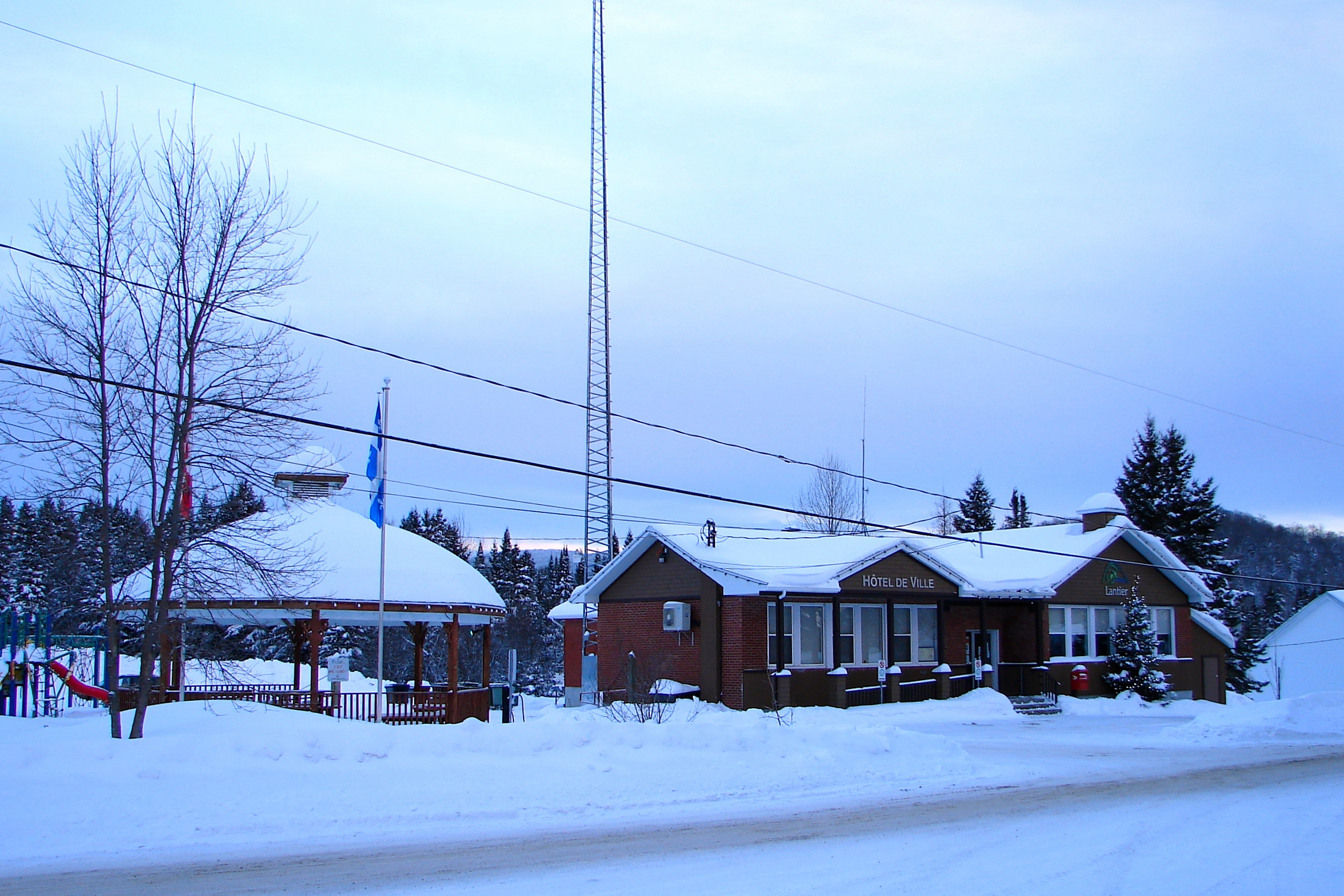 Lantier, Quebec, Canada